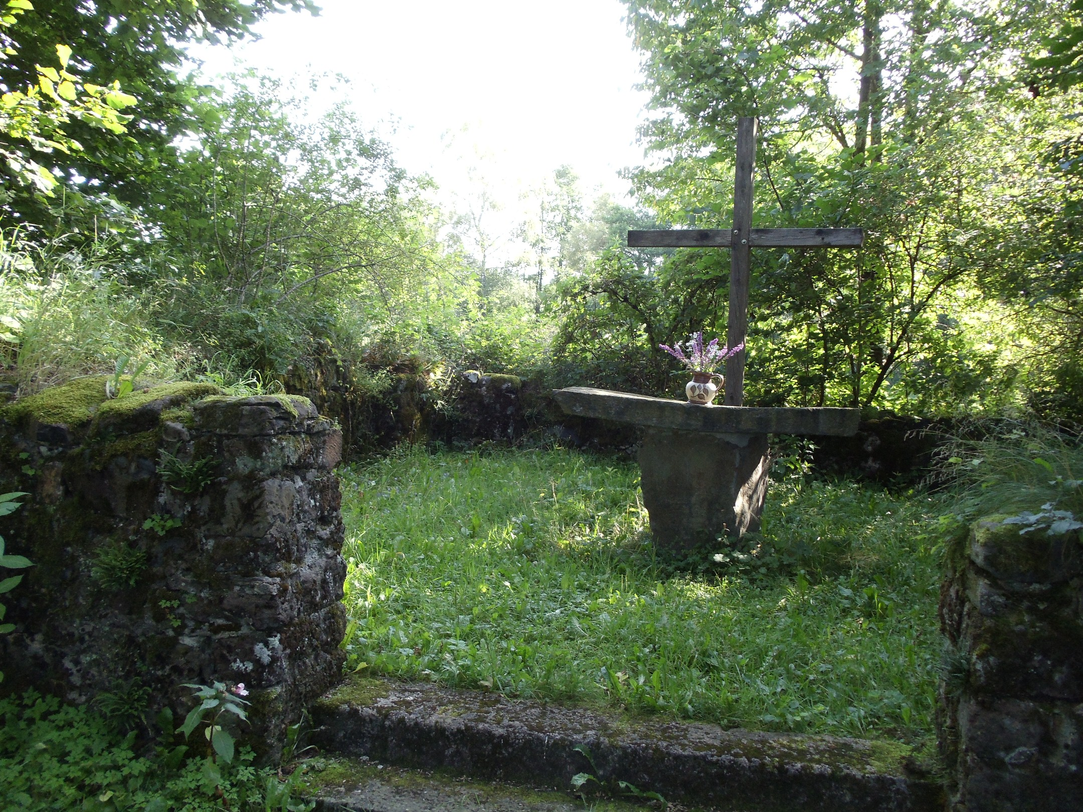 Marcellinuskapelle oder Stumpe Kirche oberhalb Burkhards im Vogelsbergkreis